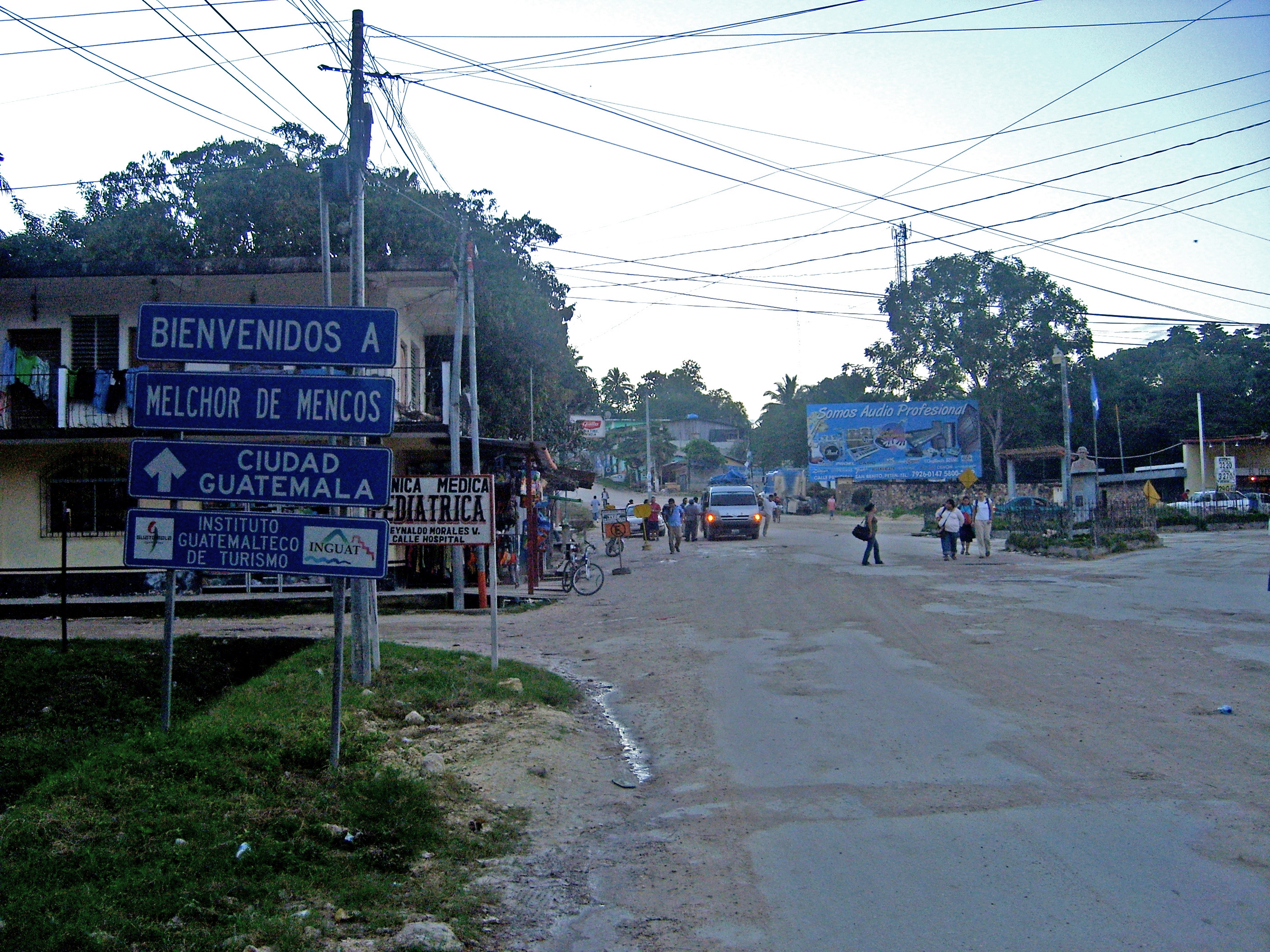 Center of Melchor de Mencos, Guatemala.